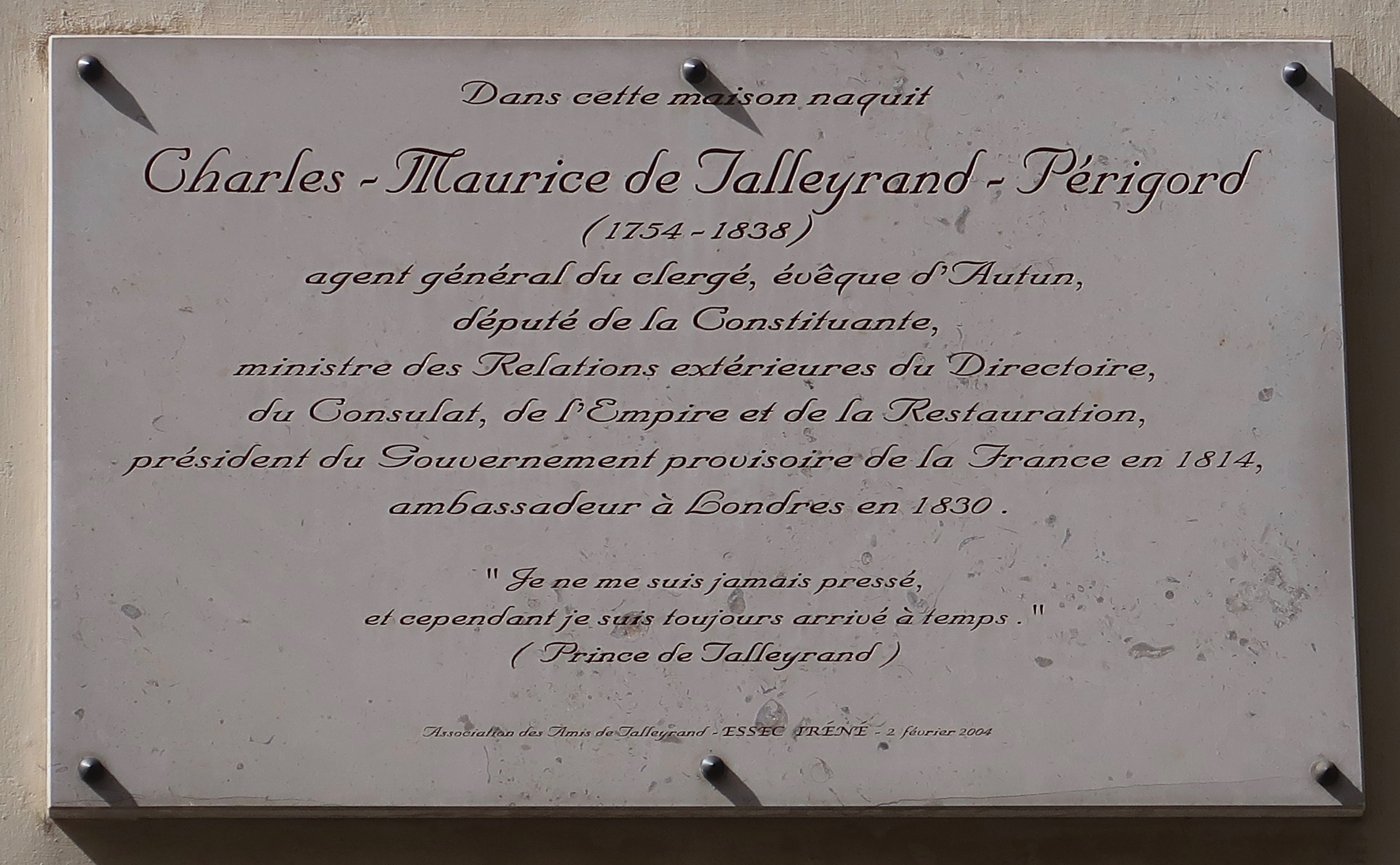 Plaque en hommage à Talleyrand, 4 rue Garancière (Paris 6).